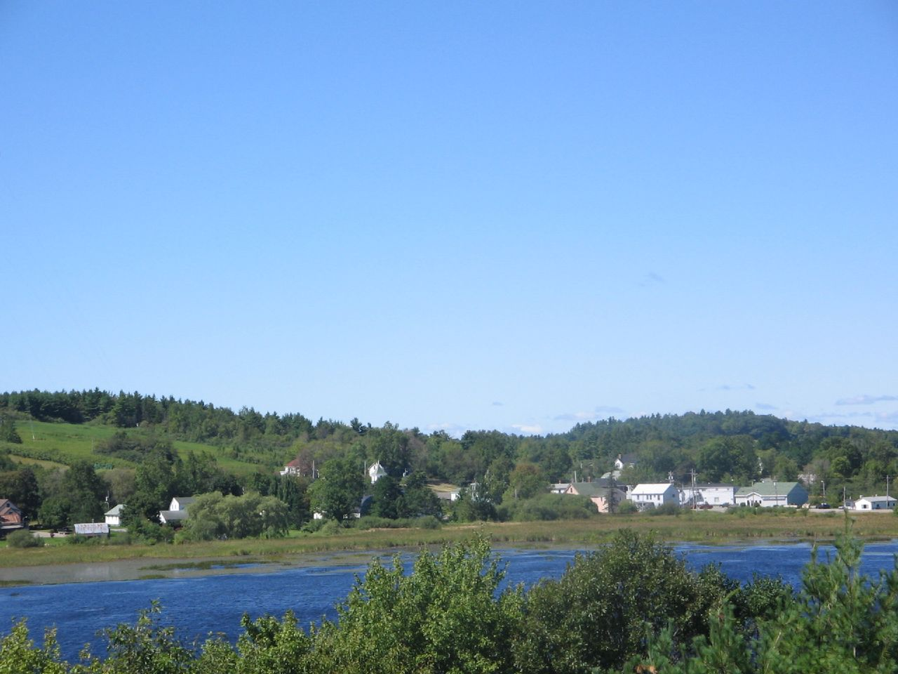 Localité de Caledonia dans le comté de Queens en Nouvelle-Écosse (Canada)